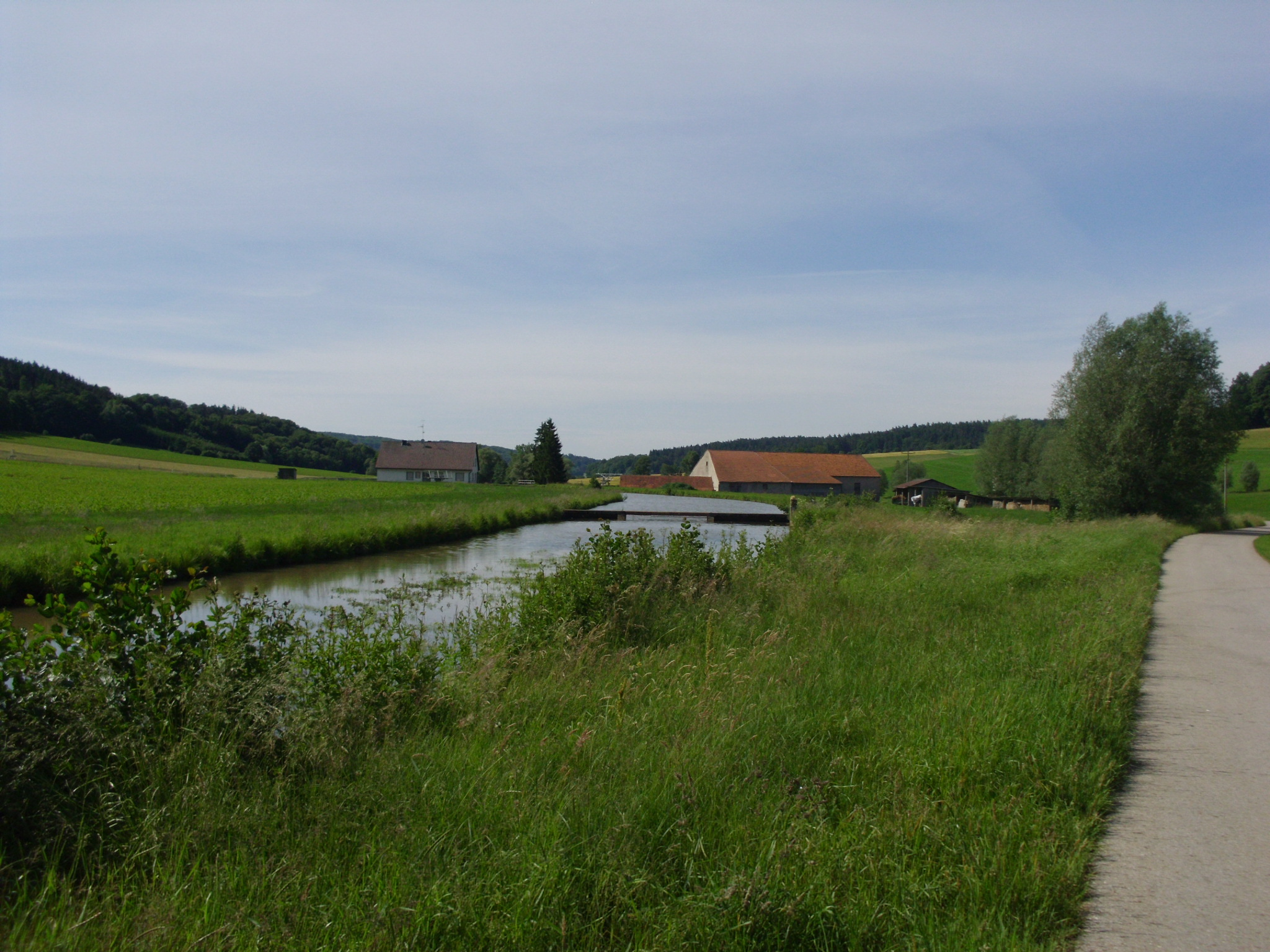 Die Balsenmühle, Ortsteil von Heidenheim im mittelfränkischen Landkreis Weißenburg-Gunzenhausen